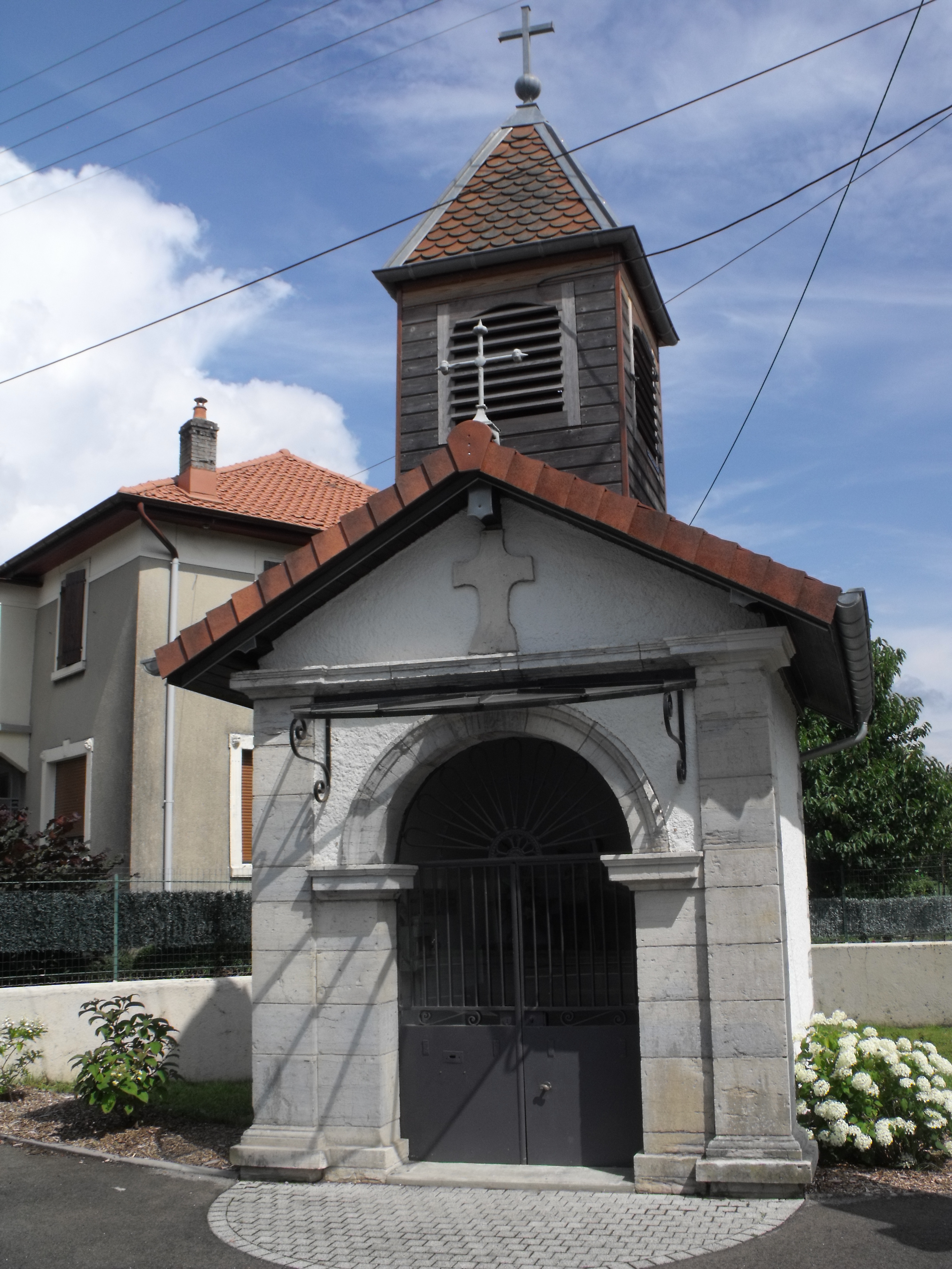 Chapelle de Berche, Doubs, France